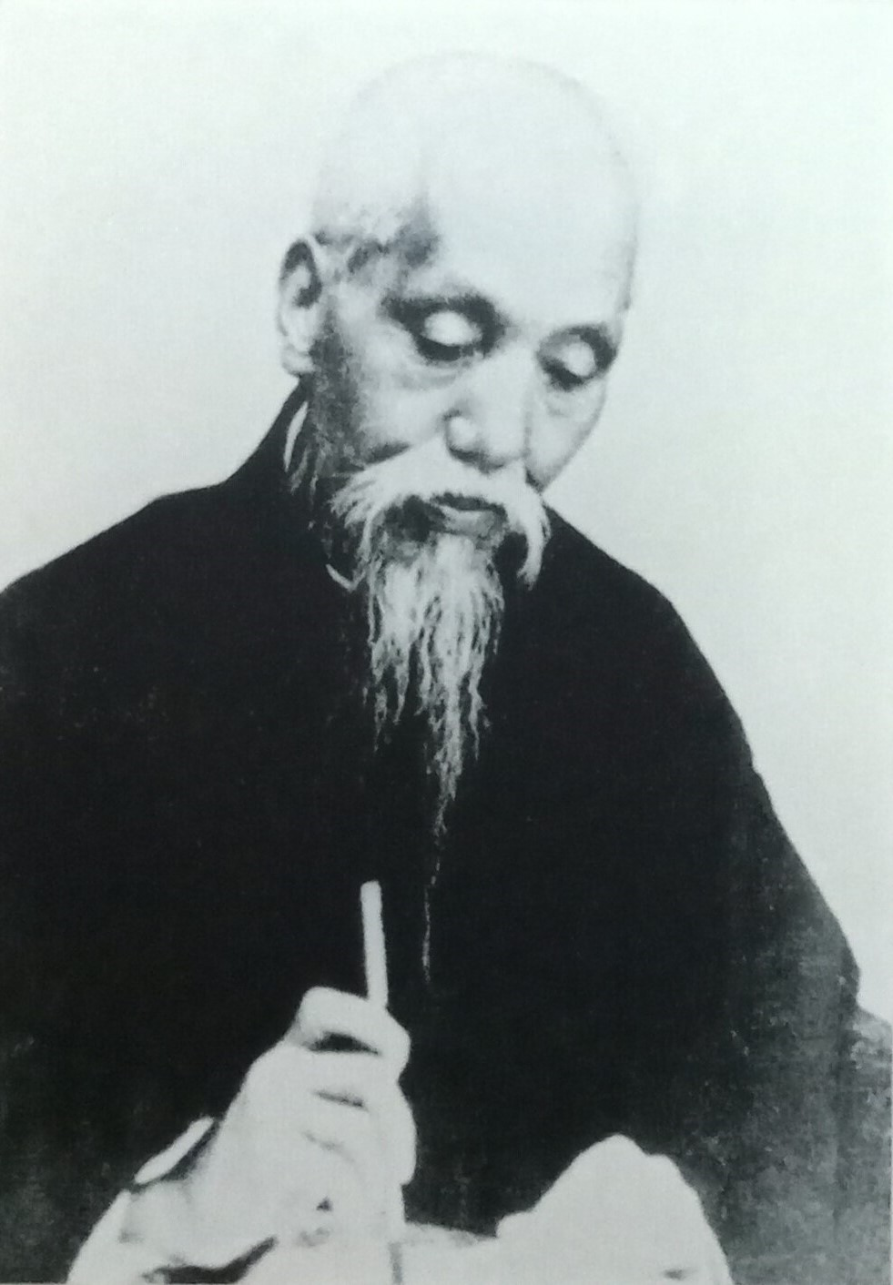 中文（中国大陆）: 大理州博物馆-人像-周钟岳